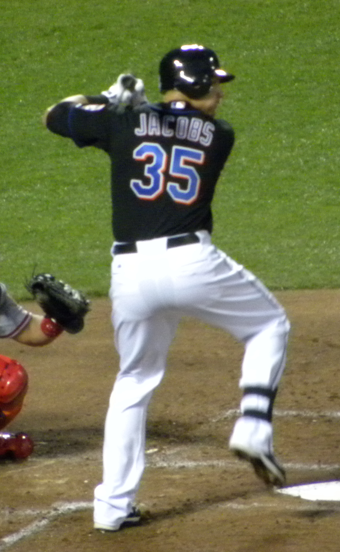 Mike Jacobs